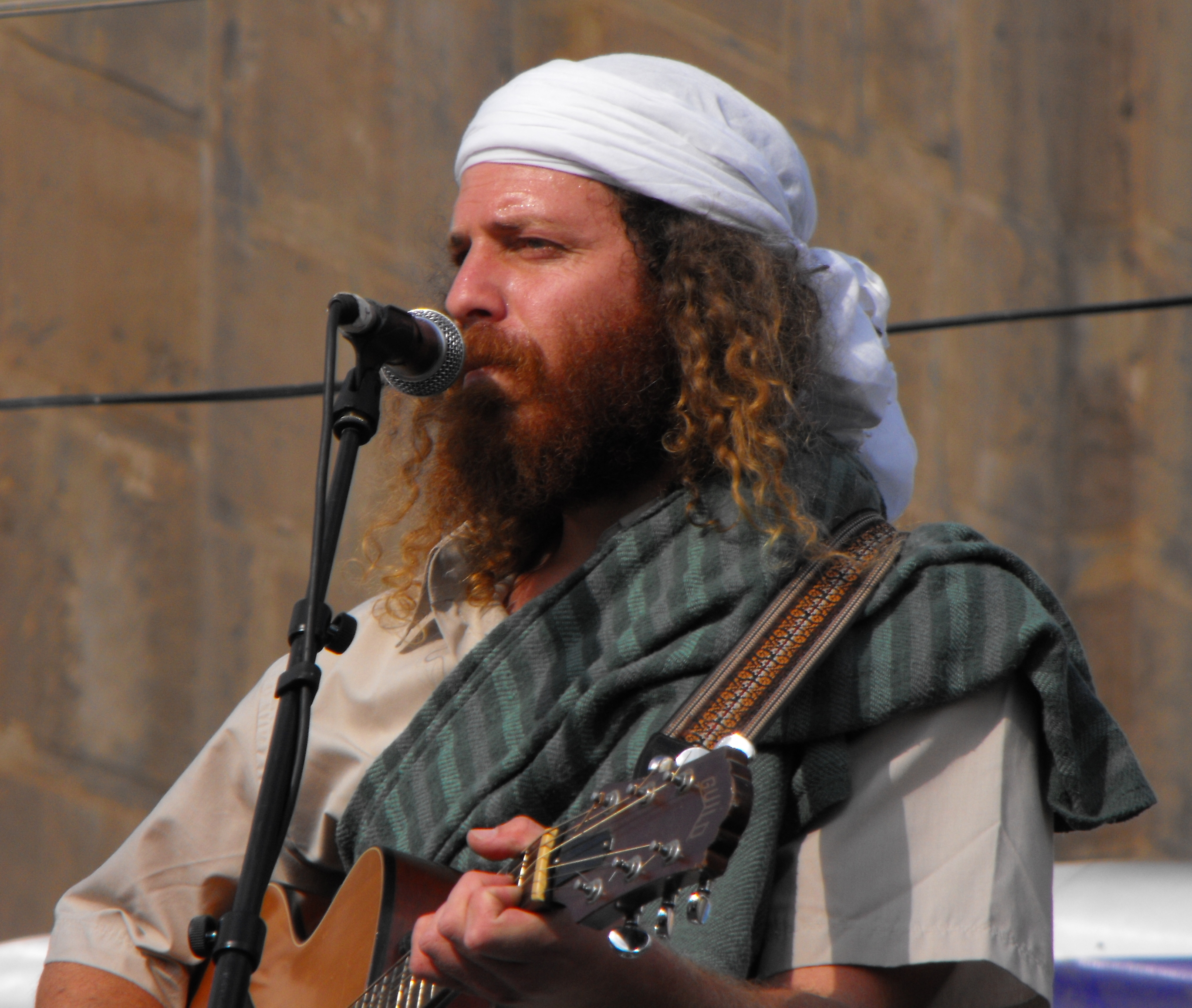 sinay tor in hevron sukot 2009 סיני תור בהופעה בחברון סוכות התשס"ט